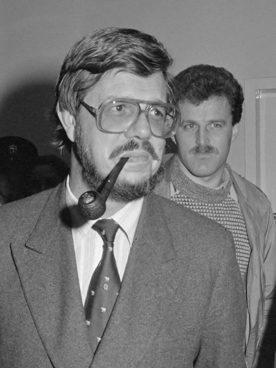 De Nederlandse beleggingsadviseur Rienk Kamer na 15 maanden gevangenis in Los Angeles wegens miljoenenzwendel terug in Nederland. Op de achtergrond Telegraaf-journalist Peter R. de Vries